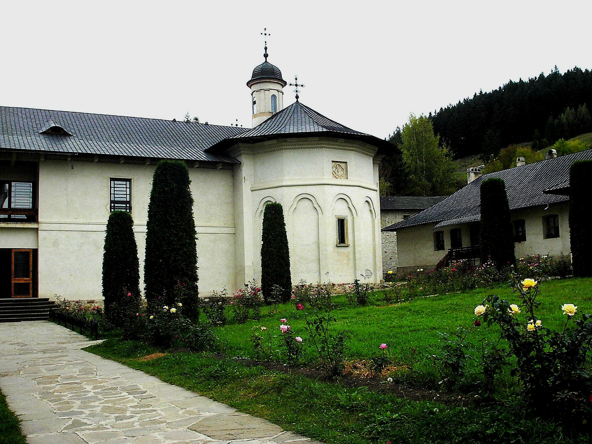 Putna, Románia: a kolostorépület